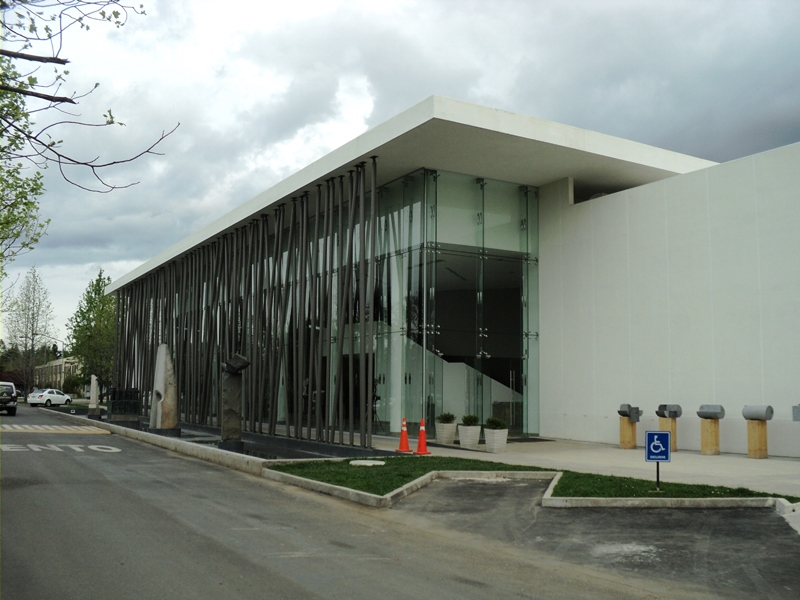 Sala Lily Garafulic, campus Lircay, Universidad de Talca.